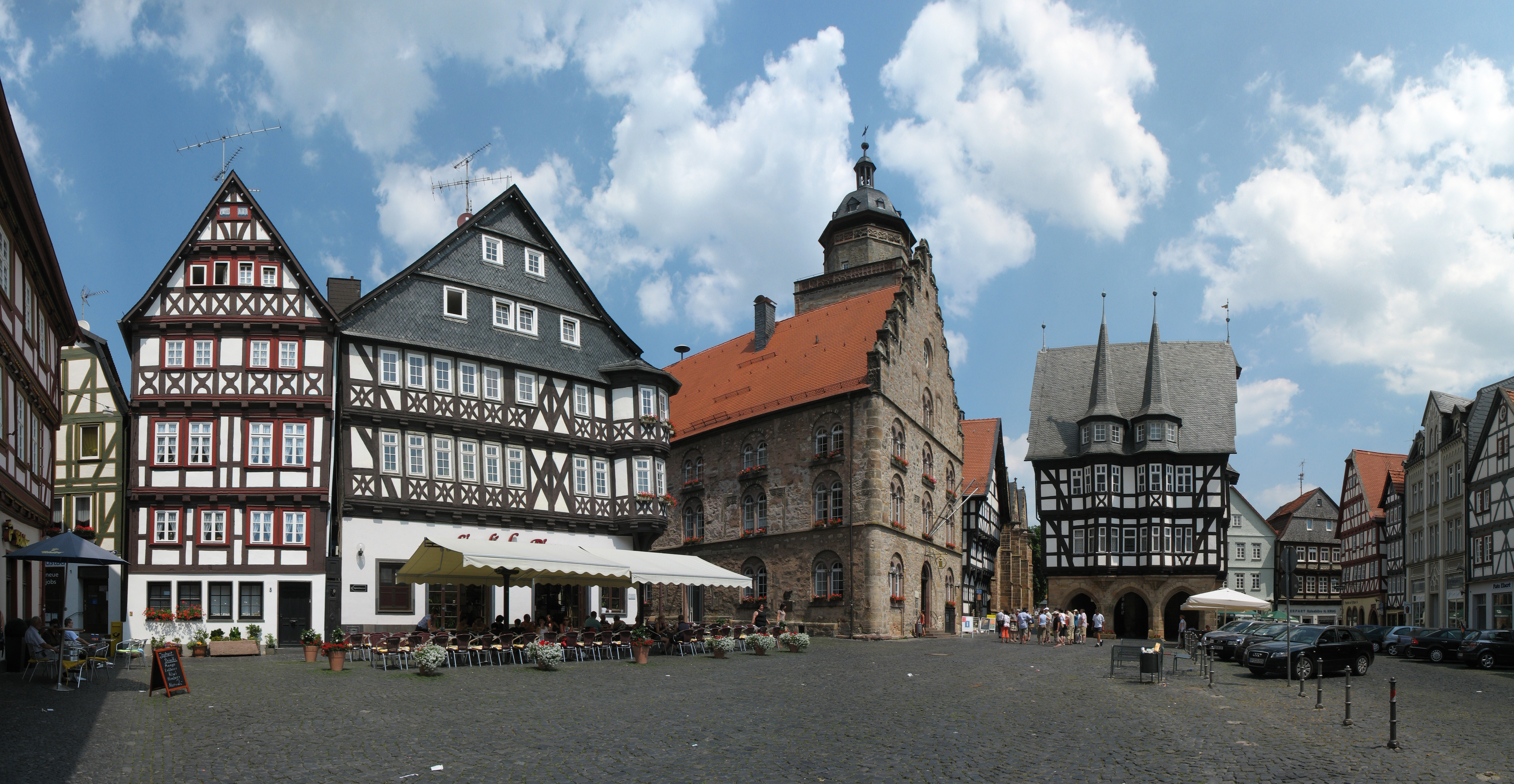 Rathaus und Marktplatz in Alsfeld.